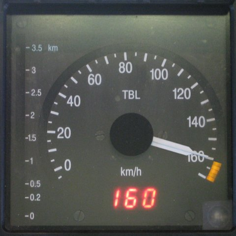 Affichage TBL2 dans une AM96